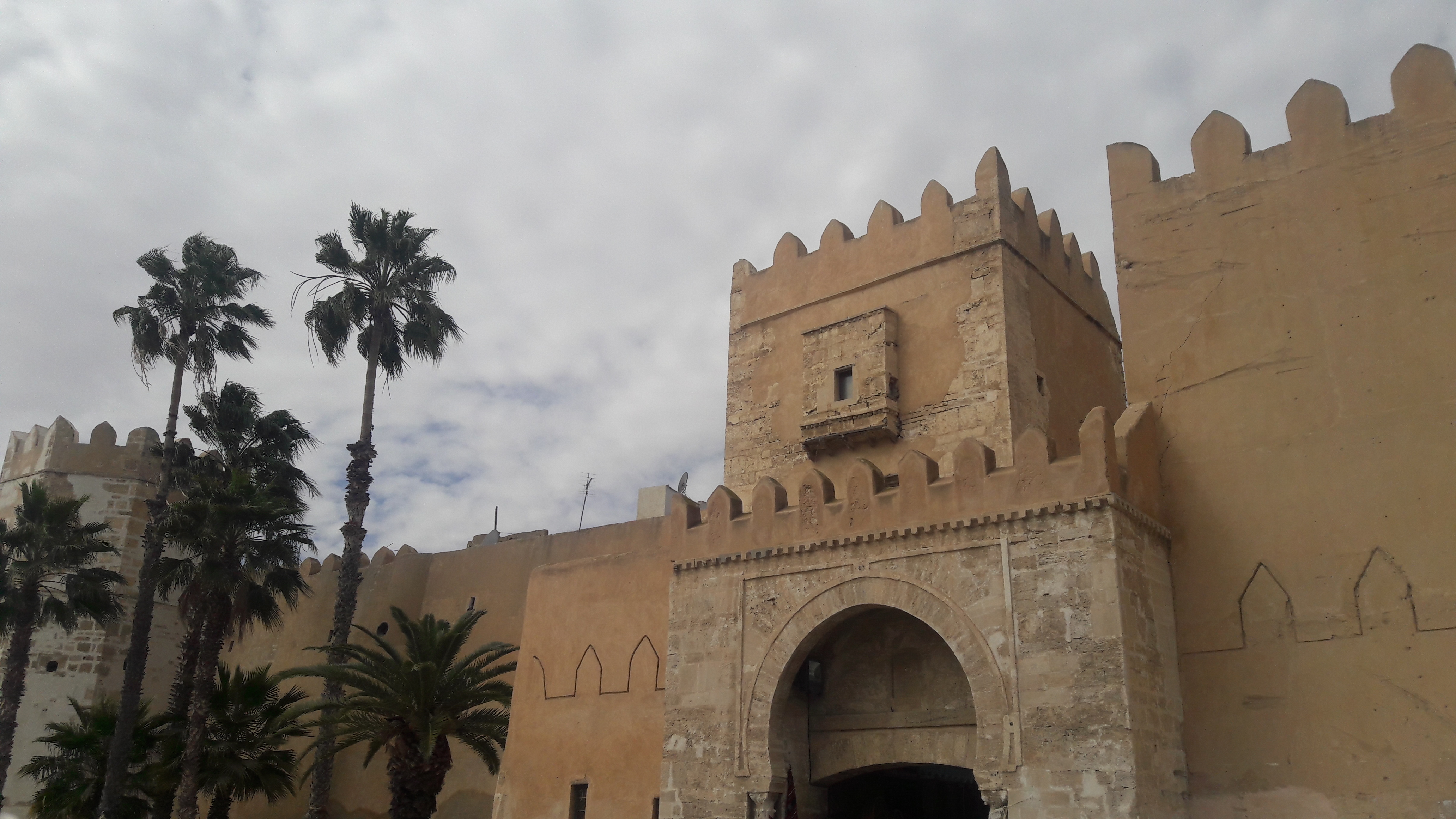 Remparts